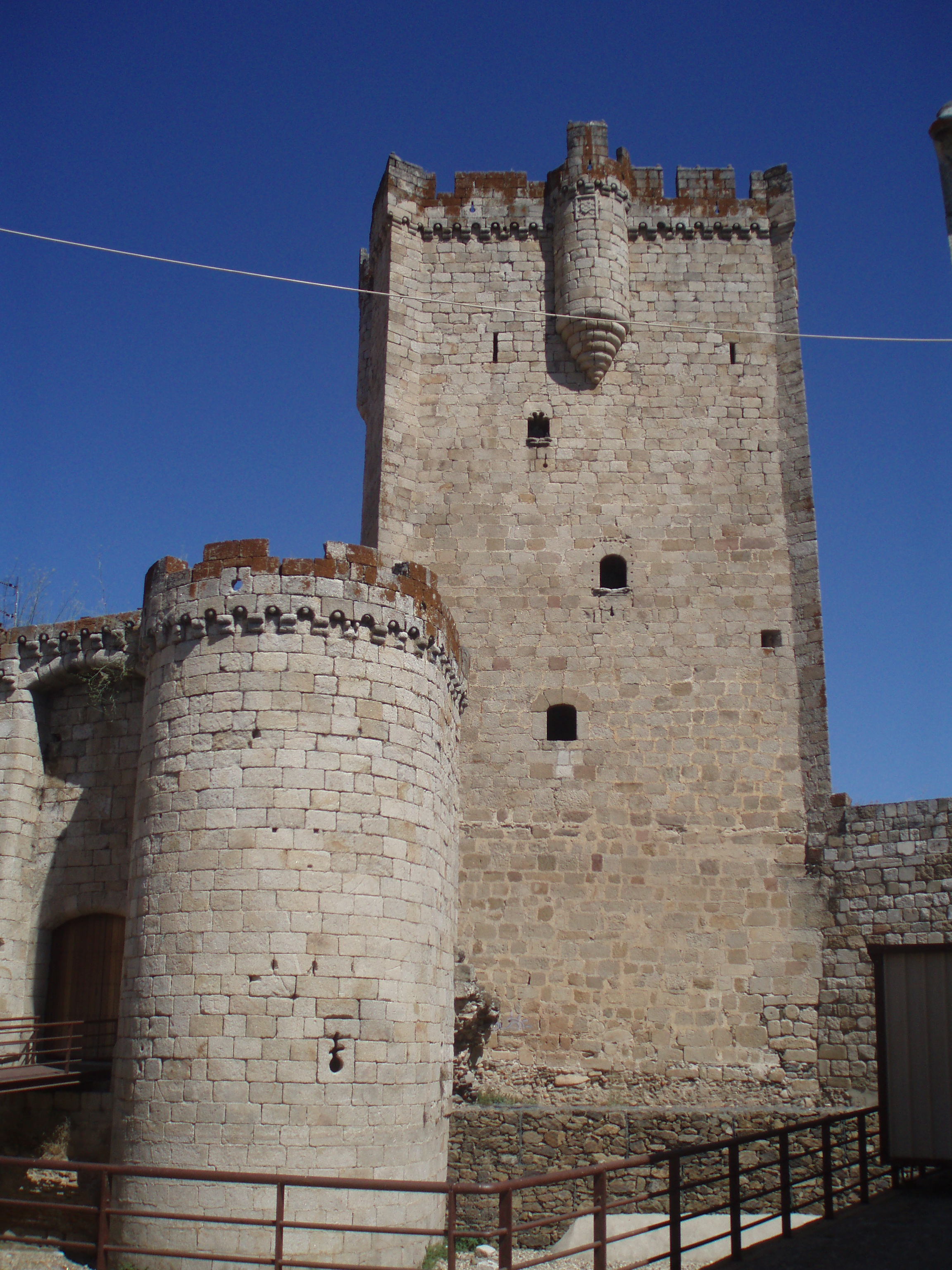 Español